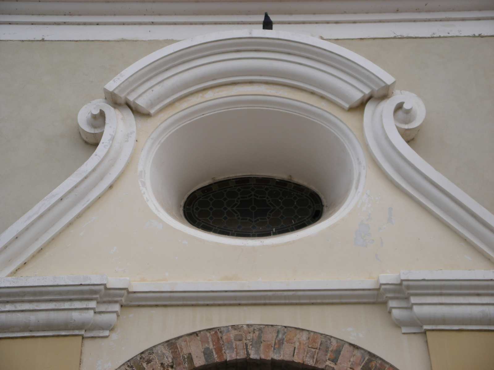 Detalle de la parte alta de la puerta lateral derecha de la Catedral de Maracaibo, en Venezuela.